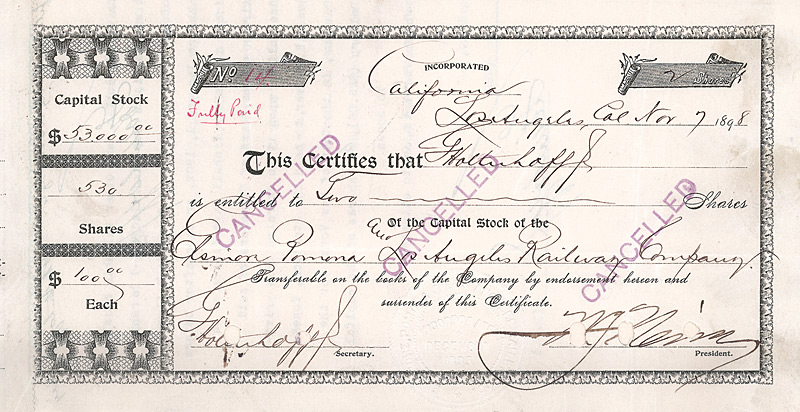 Share of the Elsinore, Pomona & Los Angeles Railway from the 7th November 1898